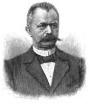 Der deutsche Zoologe August Brauer.